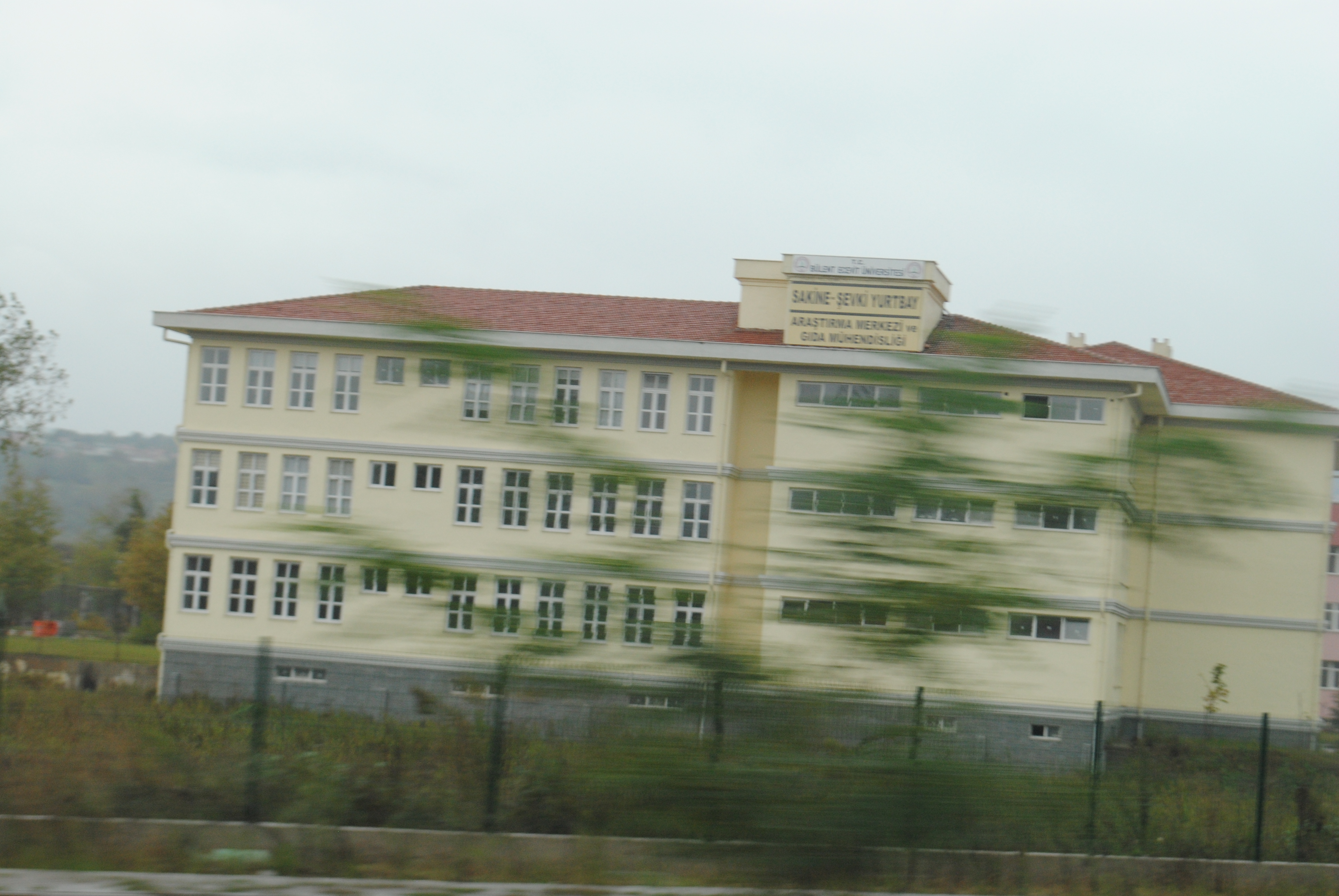 Sakine-Şevki Yurtbay Araştırma Merkezi ve Gıda Mühendisliği, Zonguldak